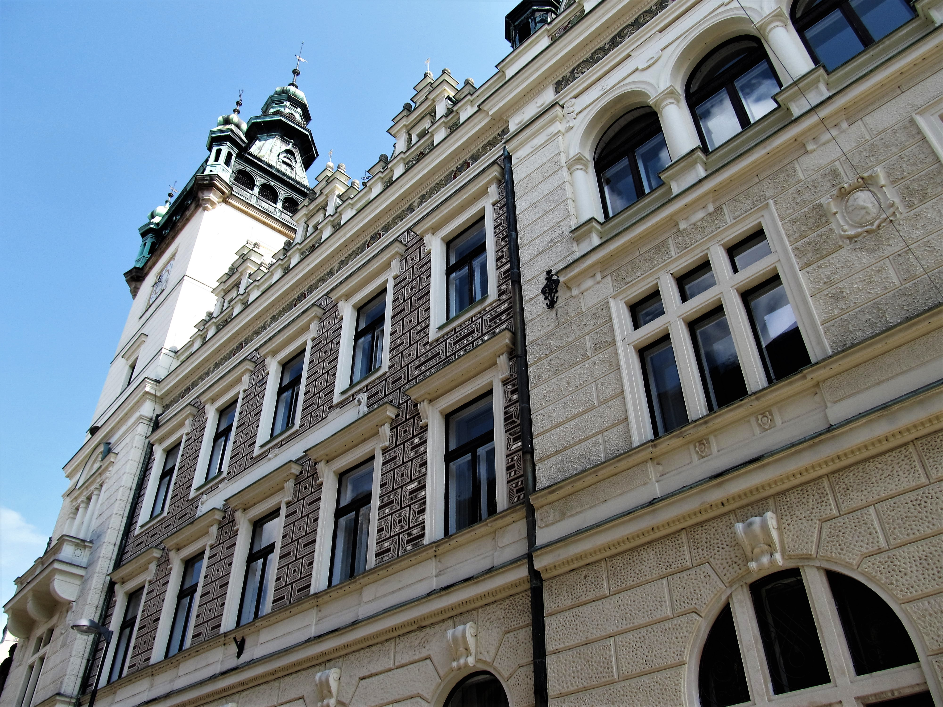 Radnice pohledem z Poštovní ulice